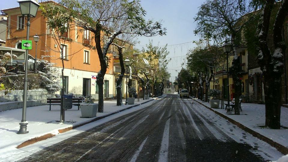 Serrastretta innevata